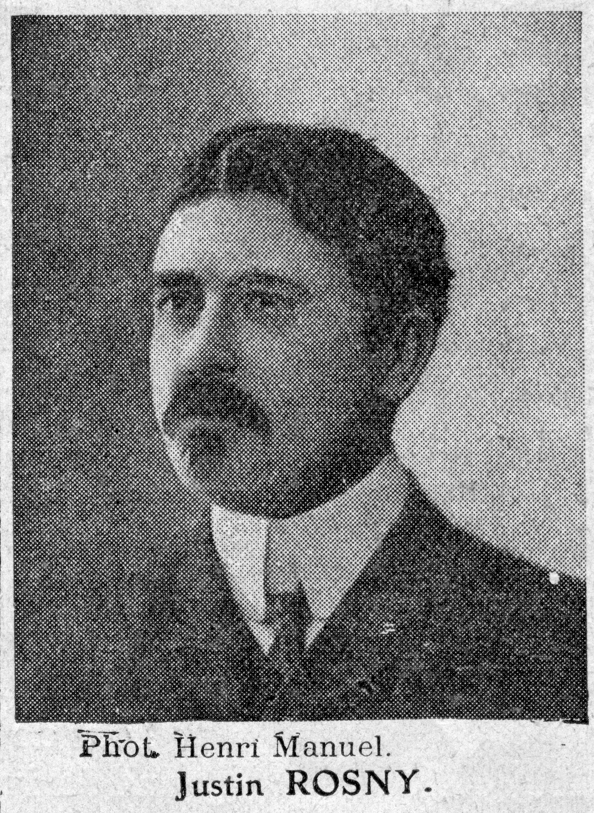 Touche à tout 1910 1er semestre p 27 Justin Rosny par Henri Manuel